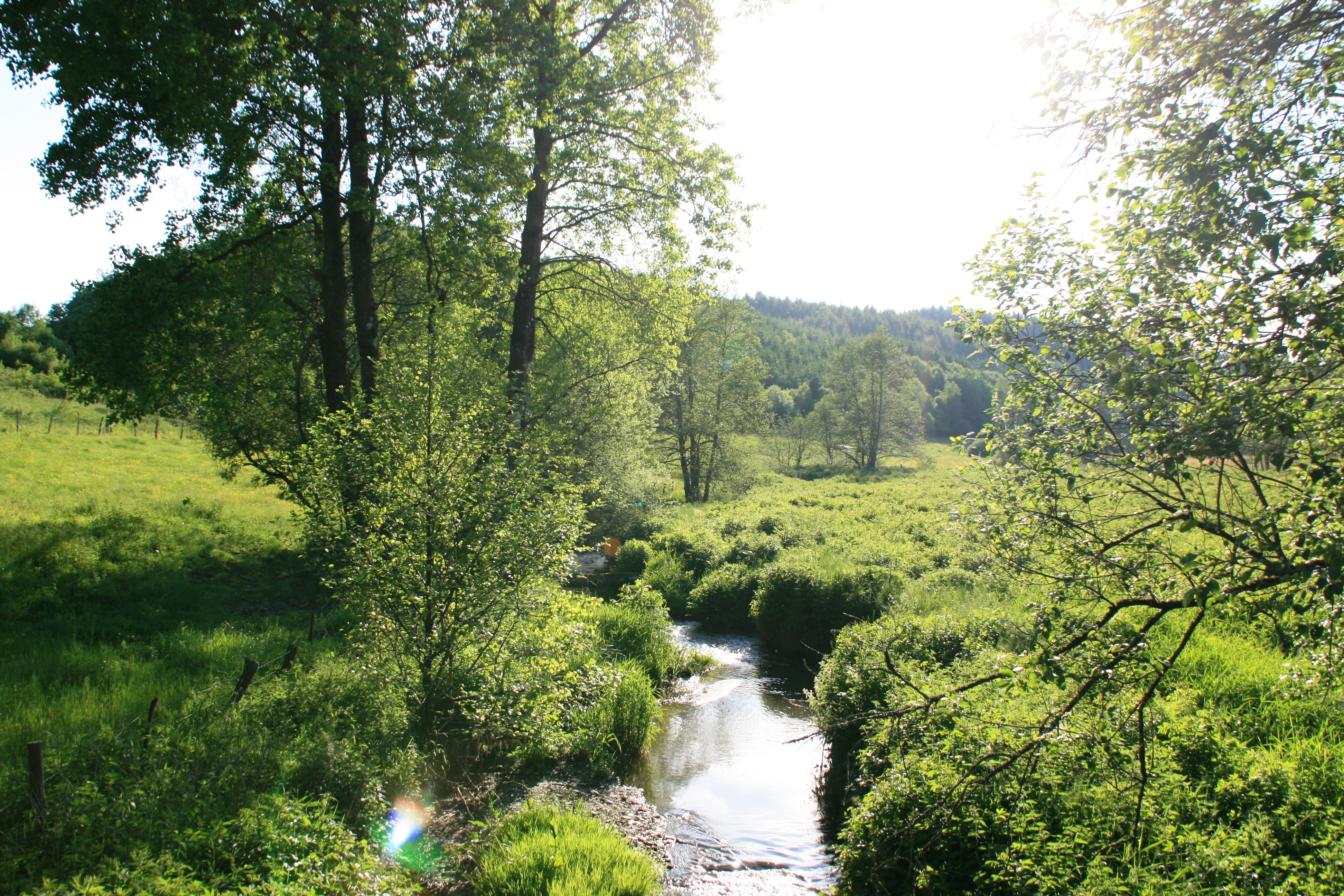 Ruisseau sur la frontière Belgique-Luxembourg